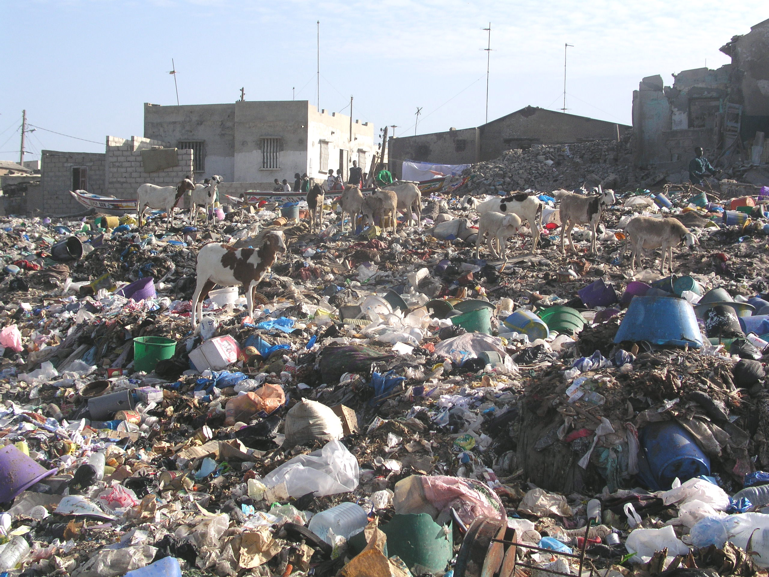 Chèvres au milieu des détritus à Yoff (Dakar, Sénégal)